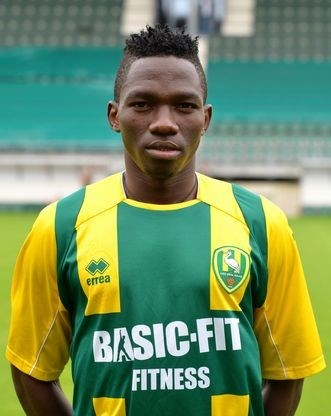 Kenneth Omeruo